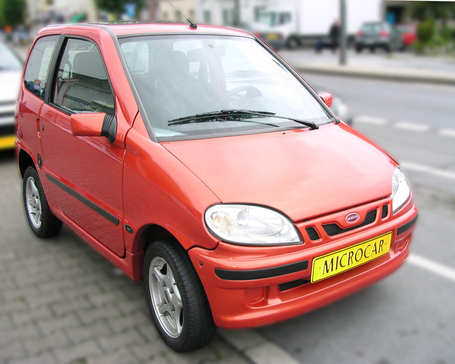 Microcar Virgo Leichtkraftfahrzeug